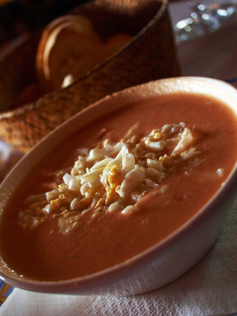 Gaspacho da Estremadura espanhola, fotografado em Albuquerque.